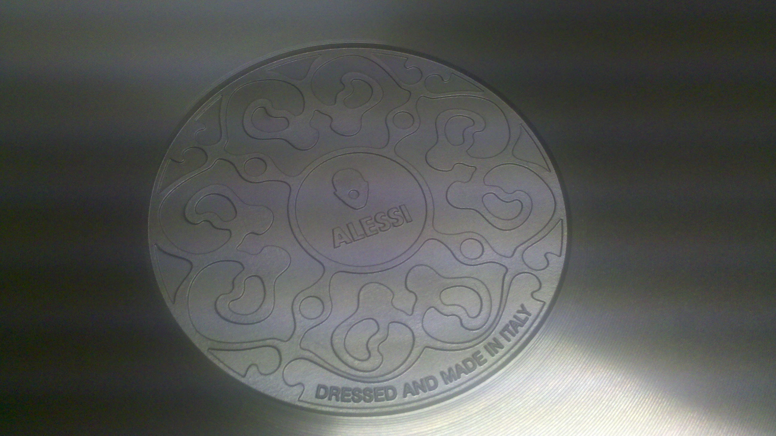 Dicitura "Made in Italy" sotto una bistecchiera ALESSI, realizzata per ESSELUNGA e disegnata dal designer Marcel Wanders. Raccolta Punti Esselunga 2013